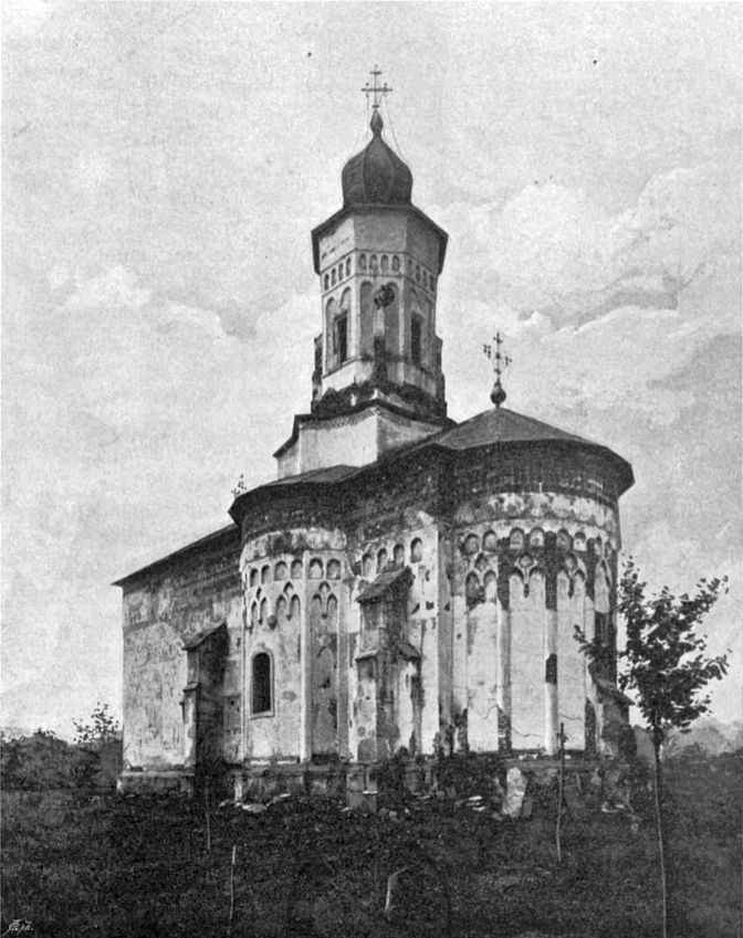 Biserica Sfântul Gheorghe din Hârlău